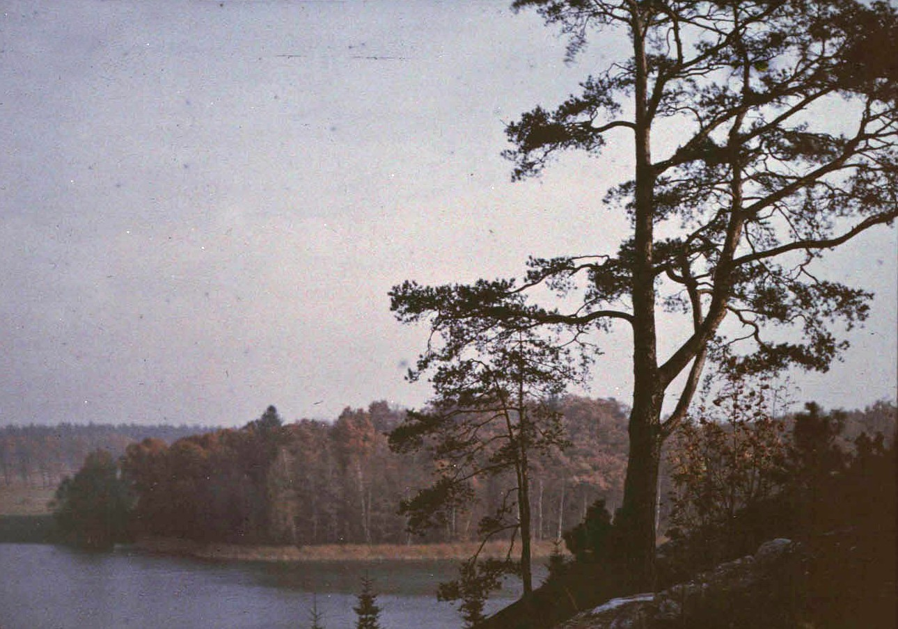 Aftonstämning vid Brunnsviken, Stockholm. Autochrome / Autokromfotografi.